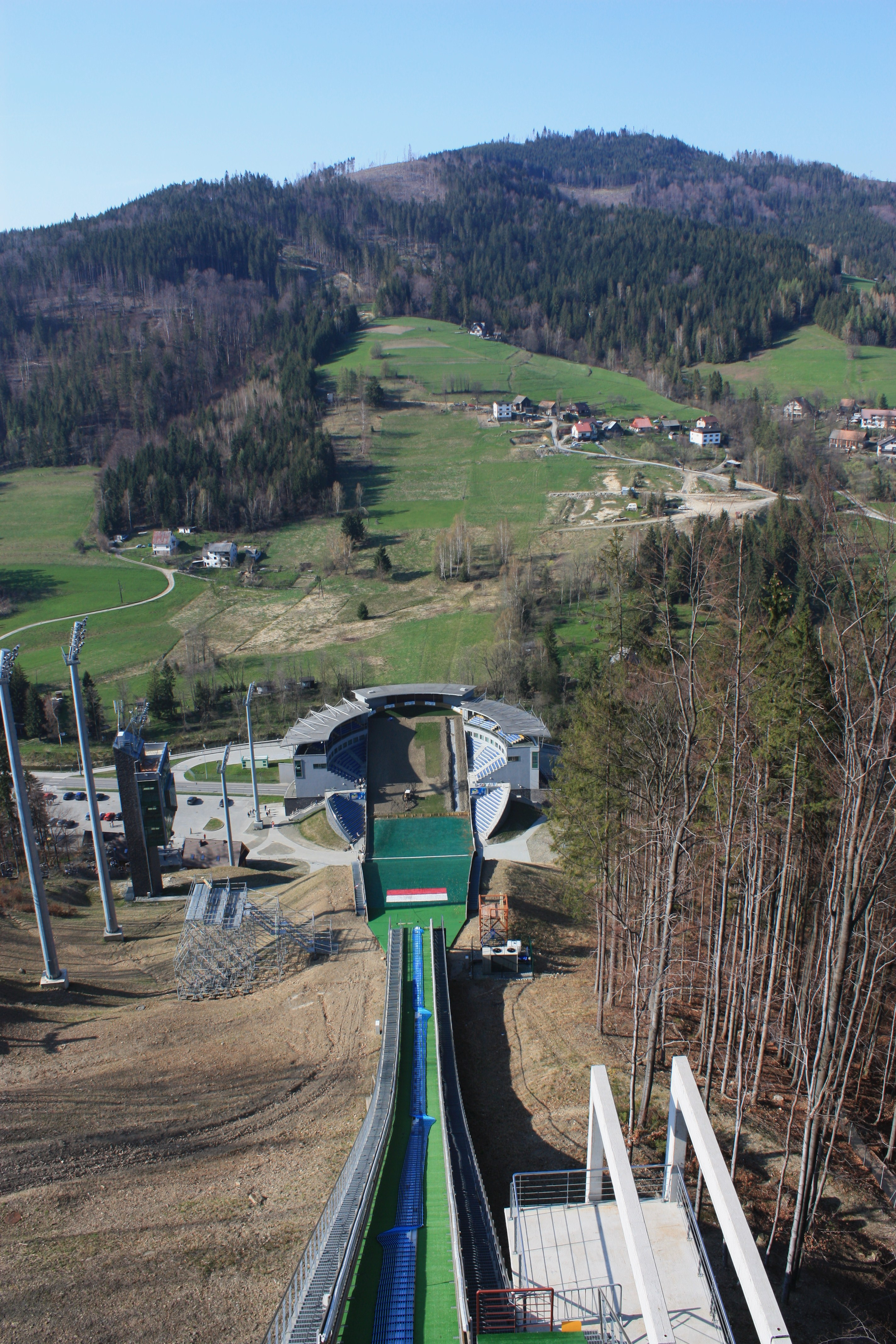 Wisła. Skocznia im. Adama Małysza.